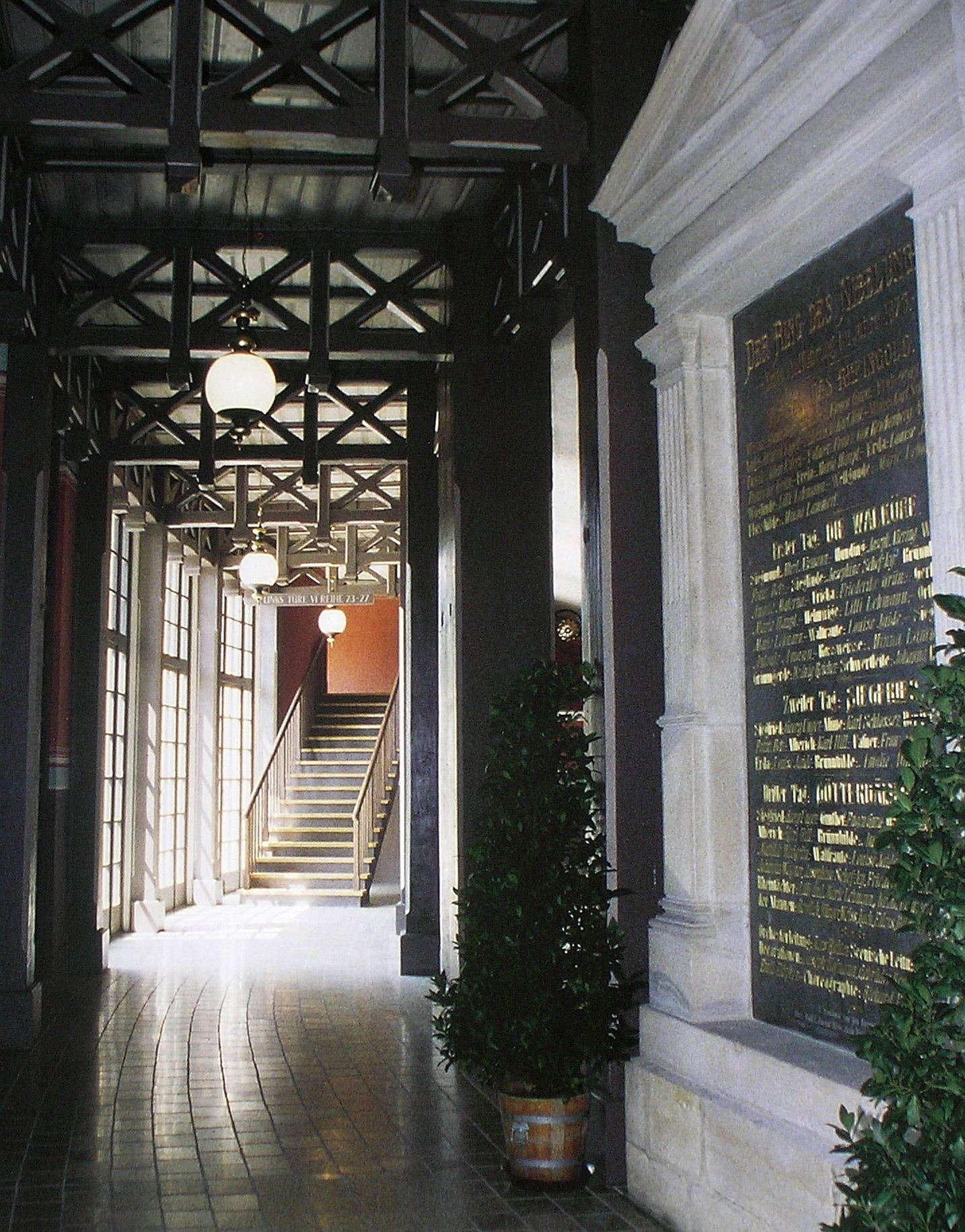 Gedenktafel zur Ur-Aufführung des Ring des Nibelungen